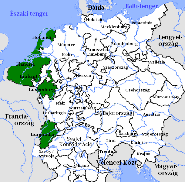 A Burgundiai körzet a Német-római Birodalomban